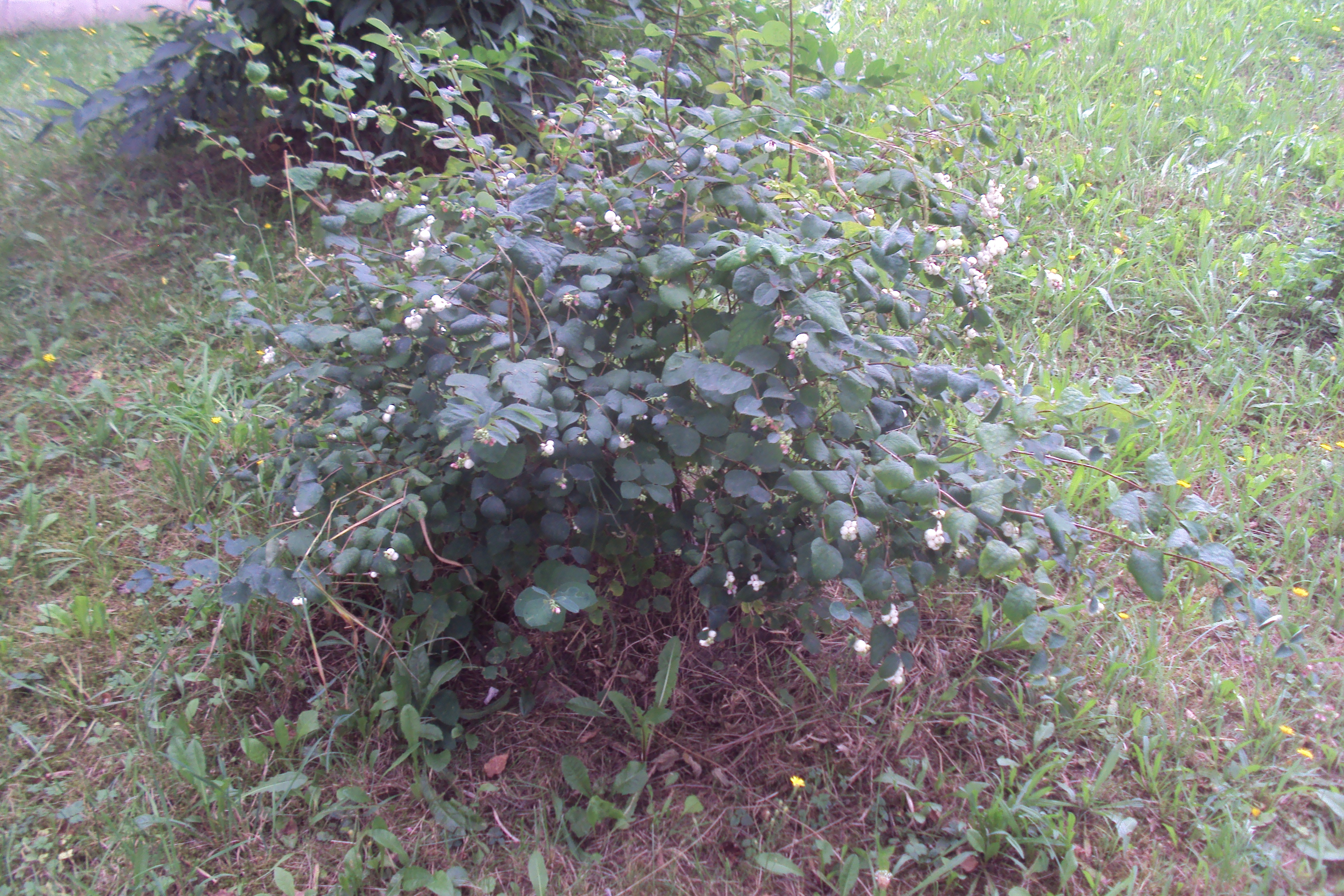 Pámelník bílý, nejen sídliště Nové Zákupy